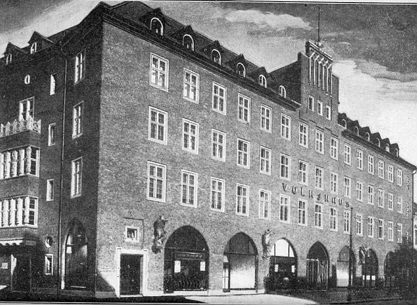 Template:Volkshaus, Bremen User:Tarawneh/rami